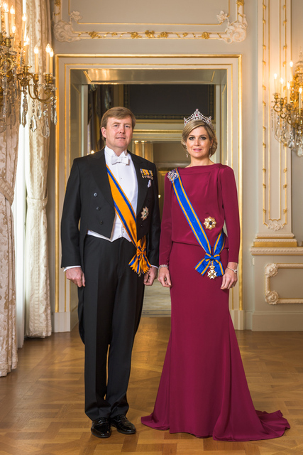 Staatsiefoto. Zijne Majesteit Koning Willem-Alexander en Hare Majesteit Koningin Máxima, april 2013.